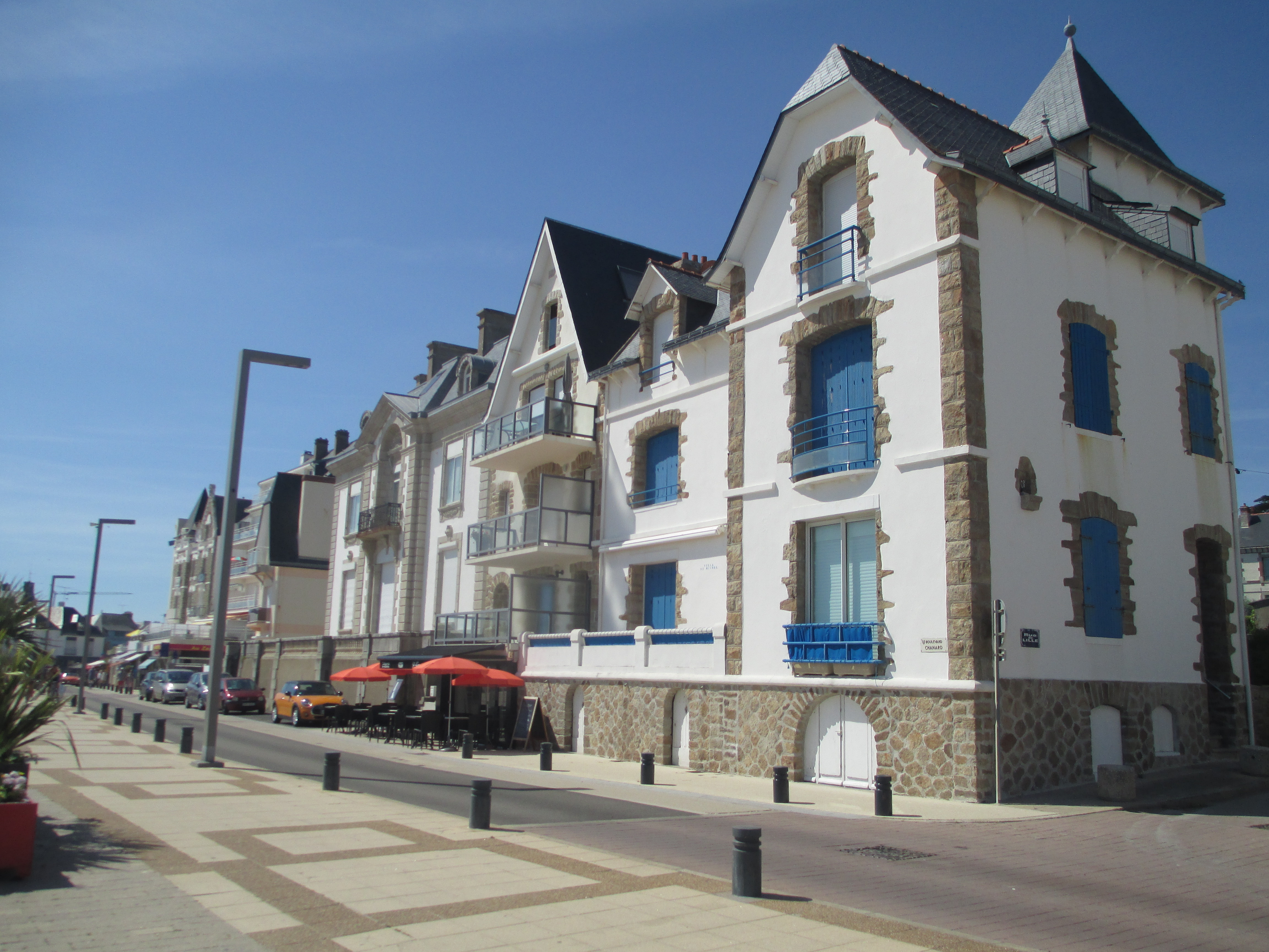 בתים בקיברון